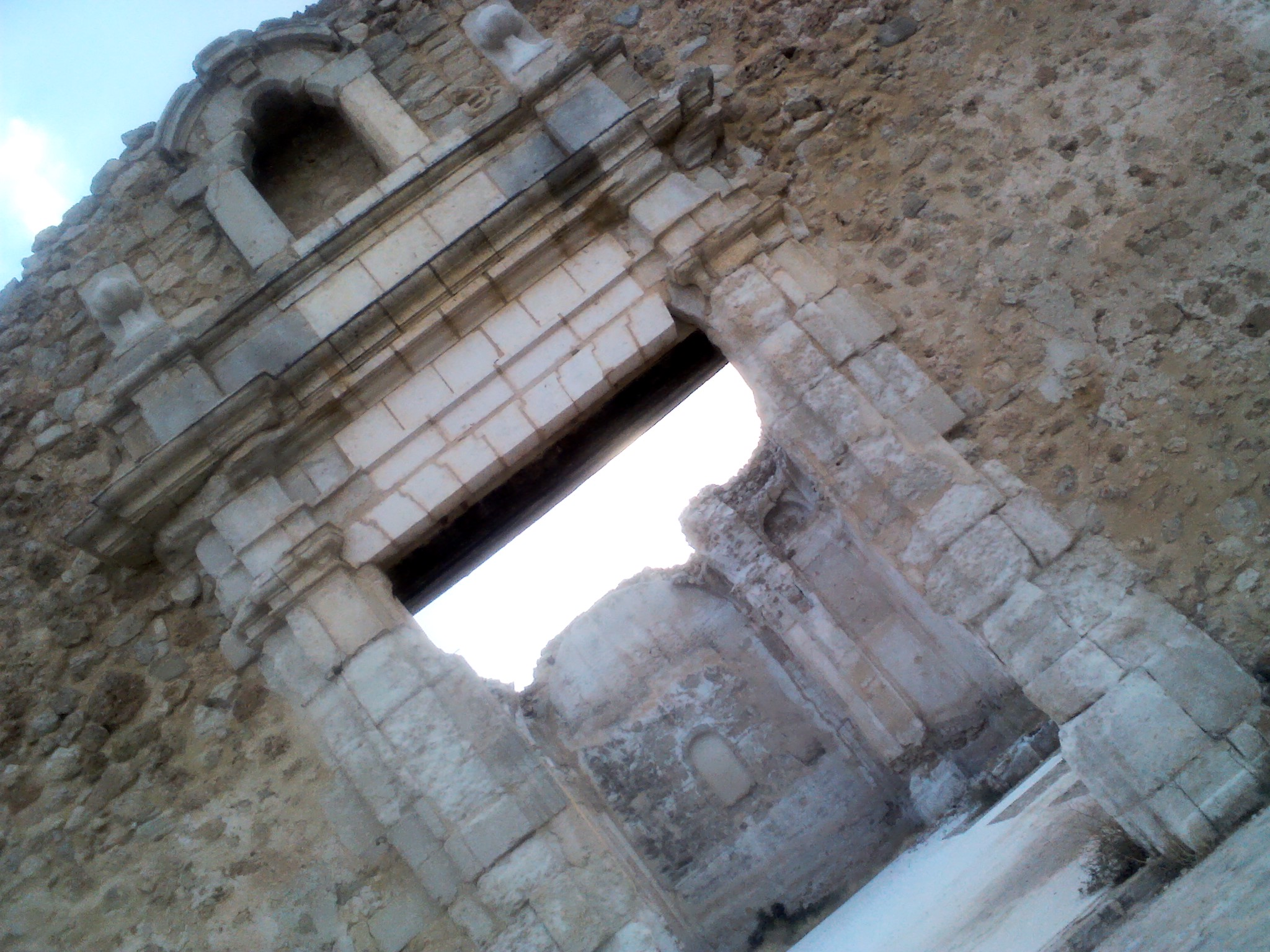 Pórtico en ruinas de la antigua Iglesia